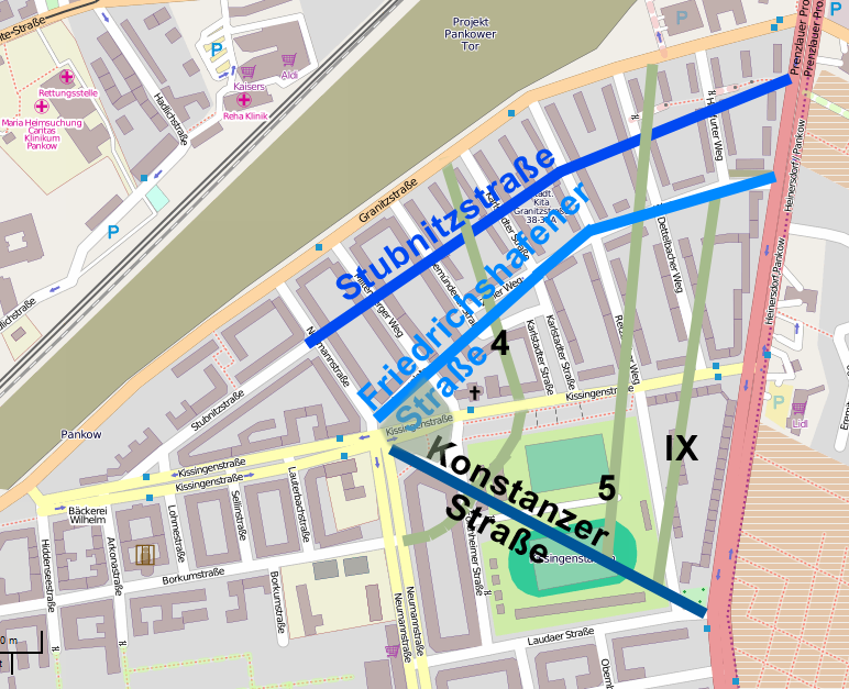 Die geplanten Straßen vor der Bebauung des Kissingenviertels (Stand 1921) im Ortsteil Alt-Pankow des Bezirkes Berlin-Pankow